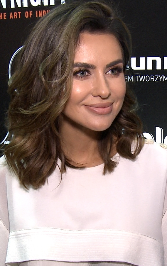 Polska celebrytka Natalia Siwiec na Flesz Fashion Night 2018.